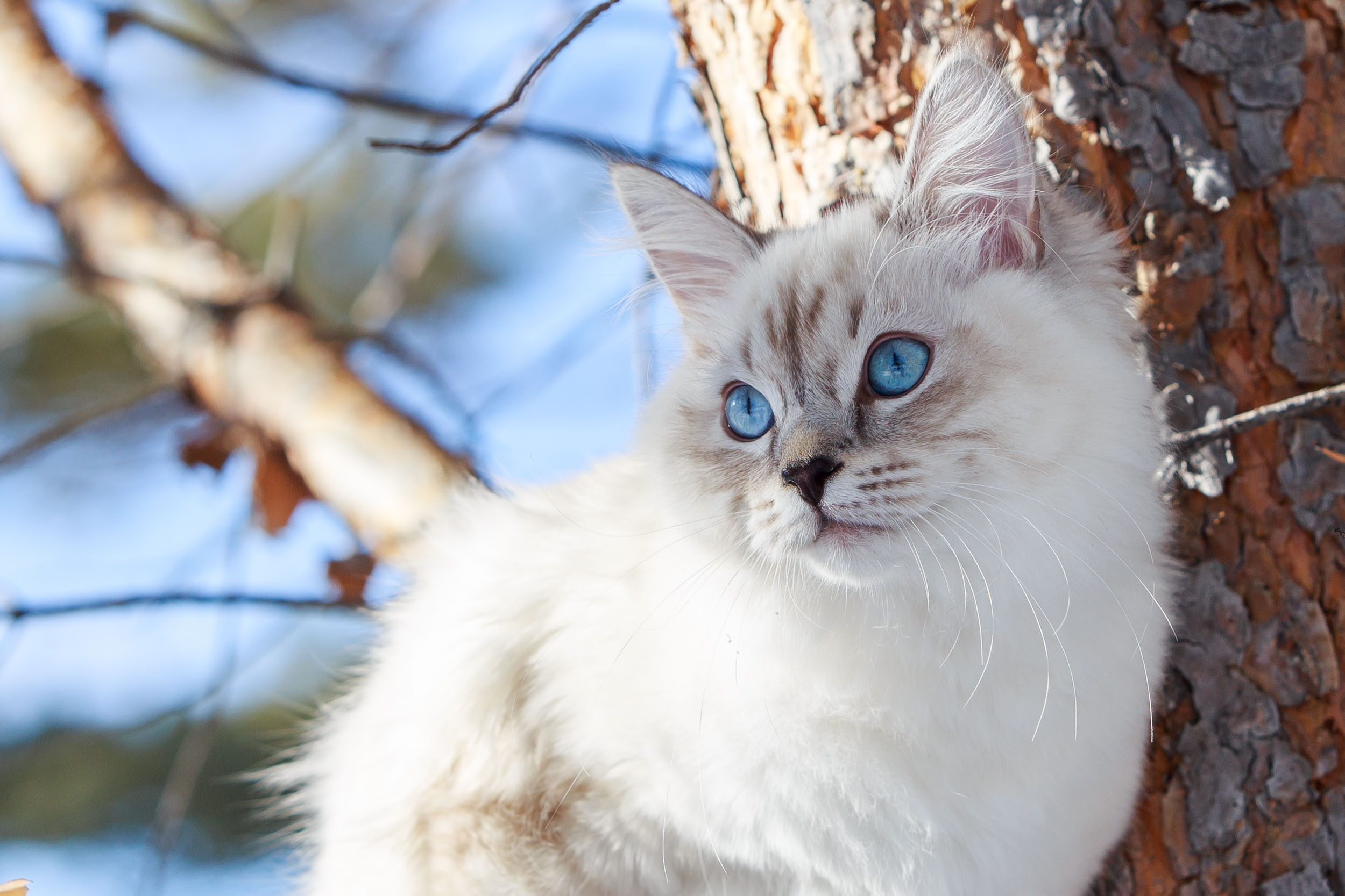 Котенок (5 месяцев) сибирской кошки окраса колор-пойнт, Невская маскарадная